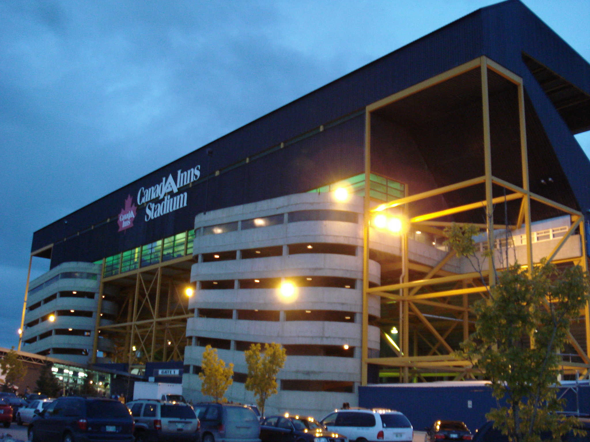 Canada Inns Stadium - Blue Bombers Stadium - Winnipeg, MB - Canada